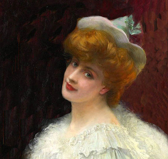 Portrait de femme. Huile.